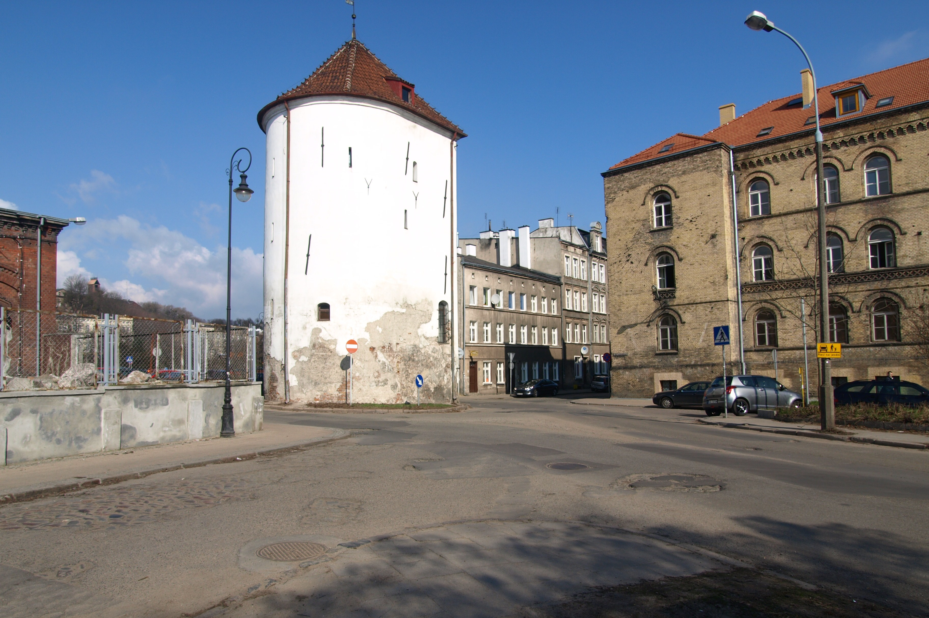 Gdańsk Stare Przedmieście - ul. Augustyńskiego i Baszta Biała, XIV, XV, XVI